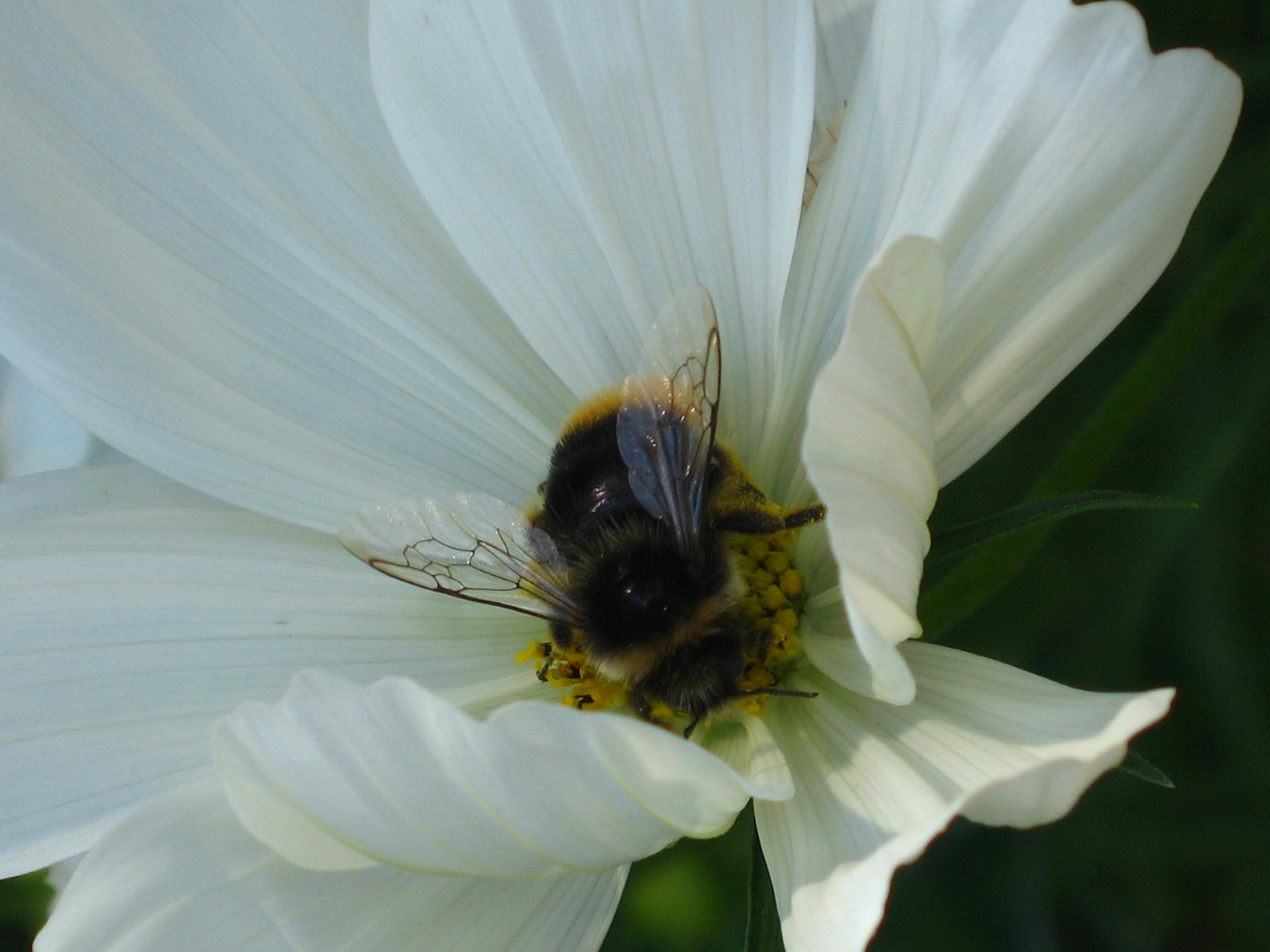 Bourdon